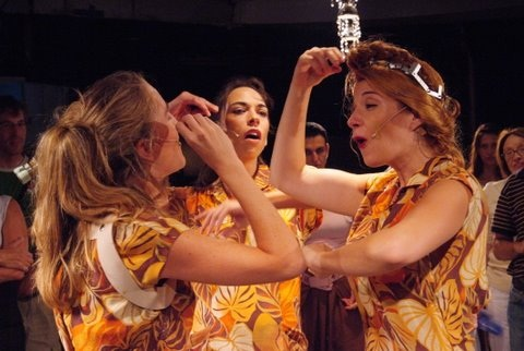 מתוך ההצגה "דודה פרידה: מוזיאון", מאת ובבימויה של נעמי יואלי